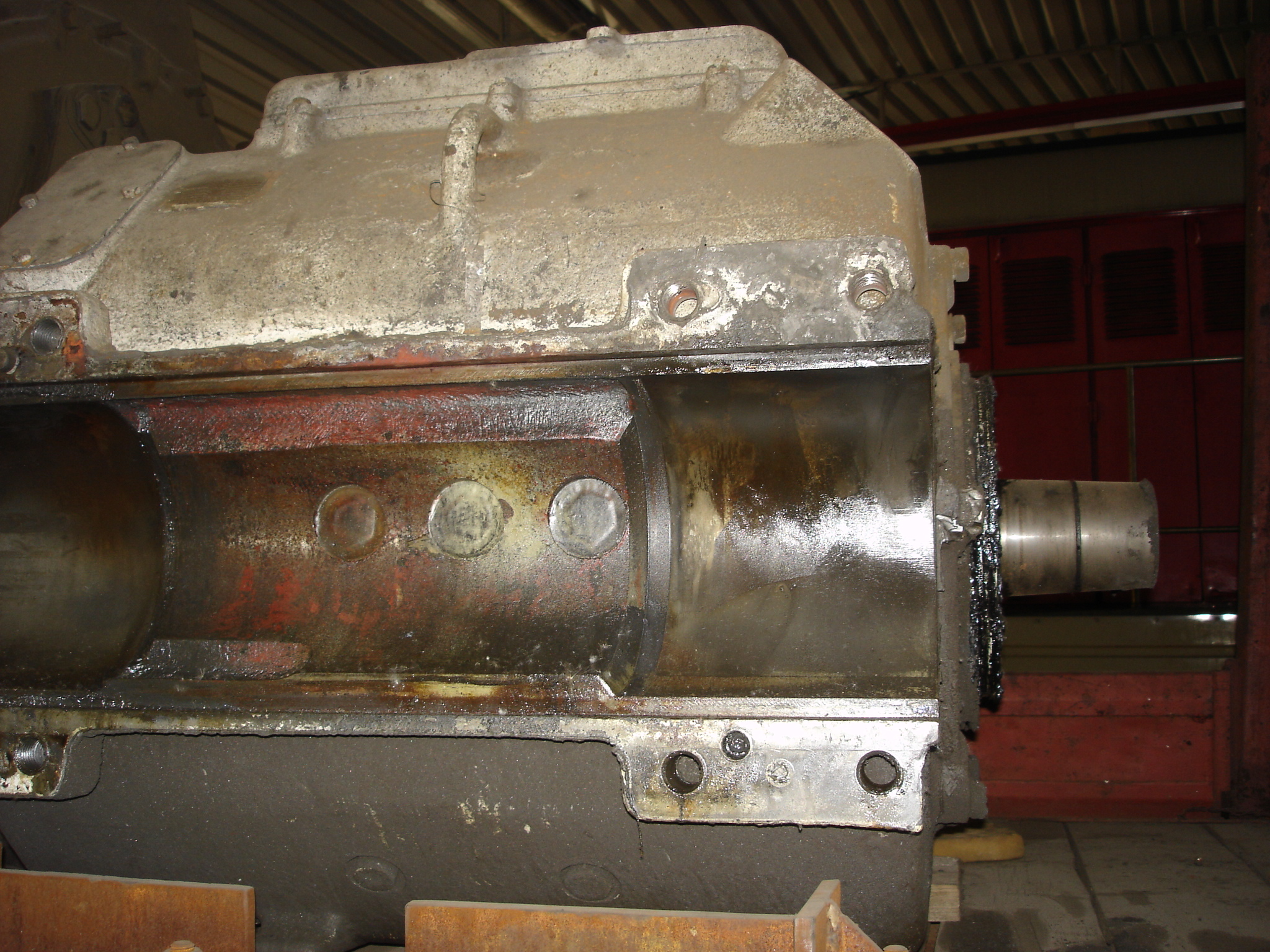 Fotografie vymontovaného elektrického motoru ležícího na vagónu v pražském vršovickém depu.